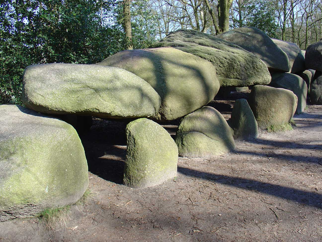 Grootste Hunebed van Nederland bij Borger (the largest hunebed in the Netherlands)